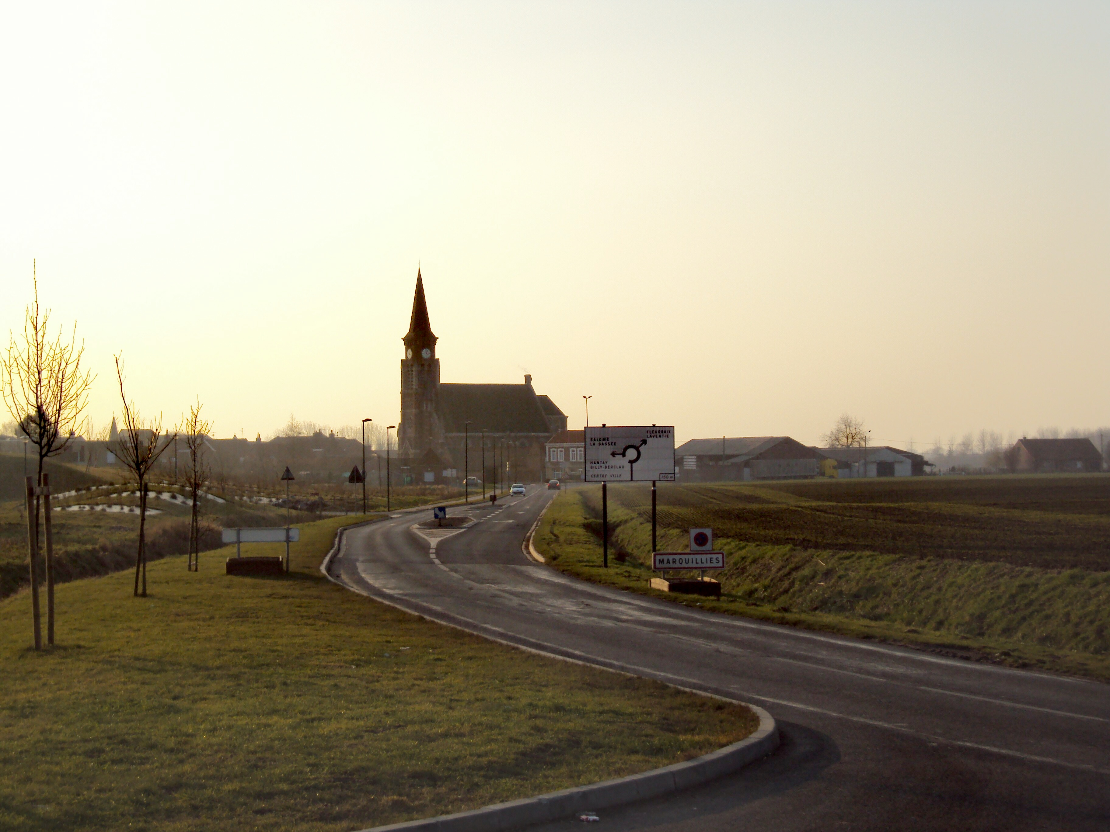 Village de Marquillies (dans le Nord, France)